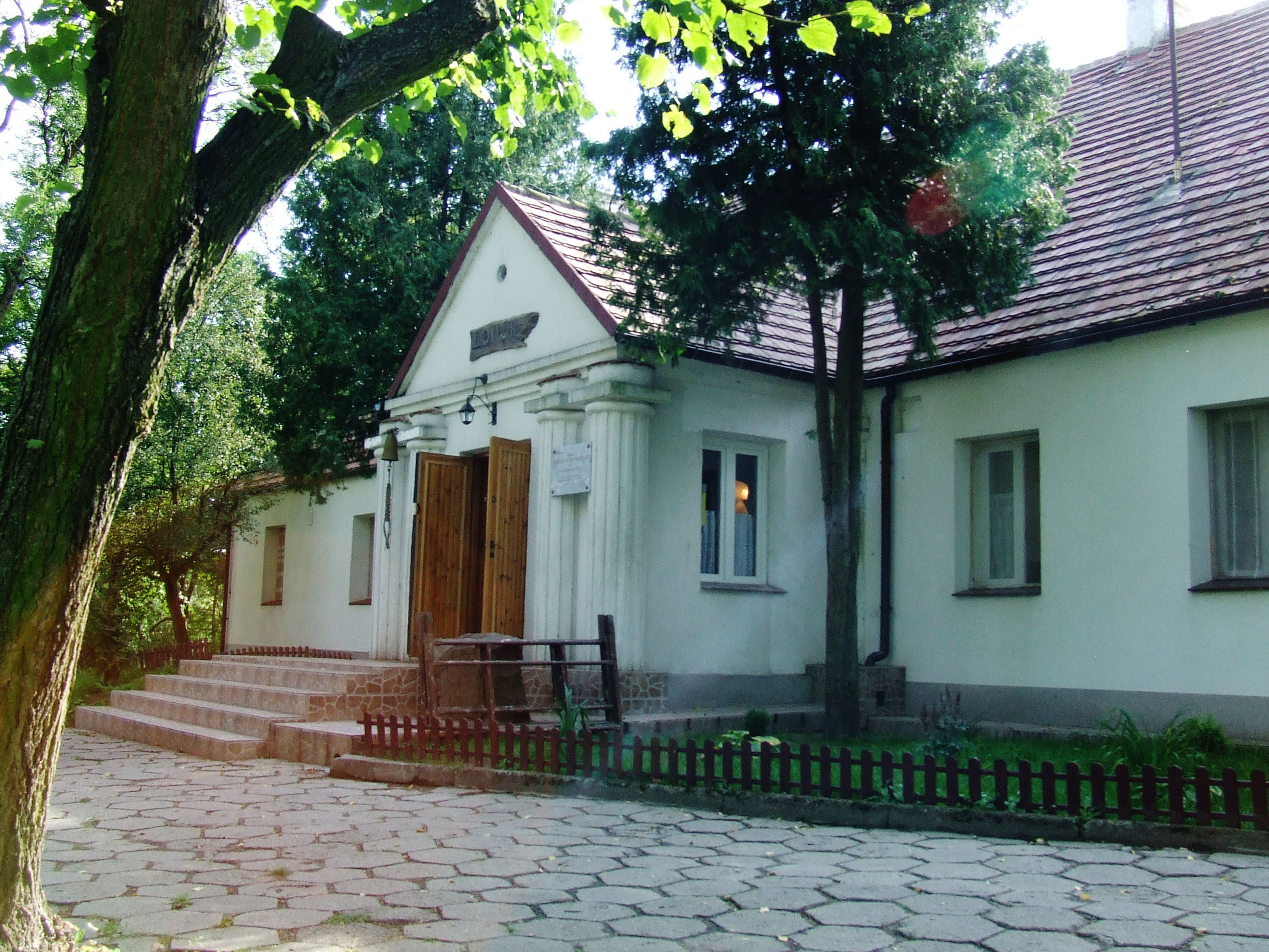 zespół dworski, 1 ćw. XIX- dwór- park Borowie, Borowie 03.1962.